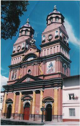 Iglesia de Amalfi Fotografía personal, Albeiro Rodas, del municipio de Amalfi, para el artículo pertinente. Donación a la wikipedia.